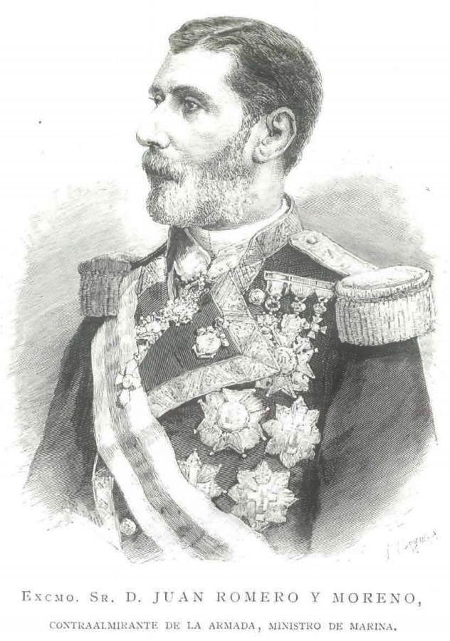 Juan Romero y Moreno, Contralmirante de la Armada, Ministro de Marina.